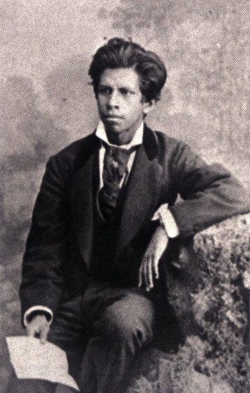 La más temprana fotografía que se conoce de Ignacio Manuel Altamirano. Archivo Casasús. Imagen tomada del libro: Ignacio Manuel Altamirano. Iconografía, México, FCE, 1993, p. 35.